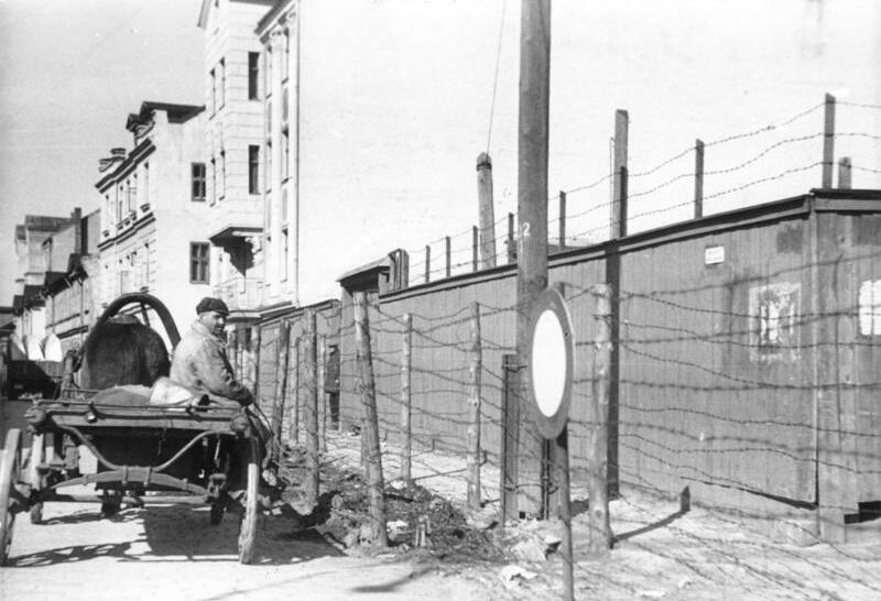 ADN-ZB/Donath II. Weltkrieg 1939 - 1945 Judenverfolgung durch die faschistischen deutschen Besatzungstruppen in der Sowjetunion. Lettische SSR: Das Judenghetto in Riga. Aufn. 1942